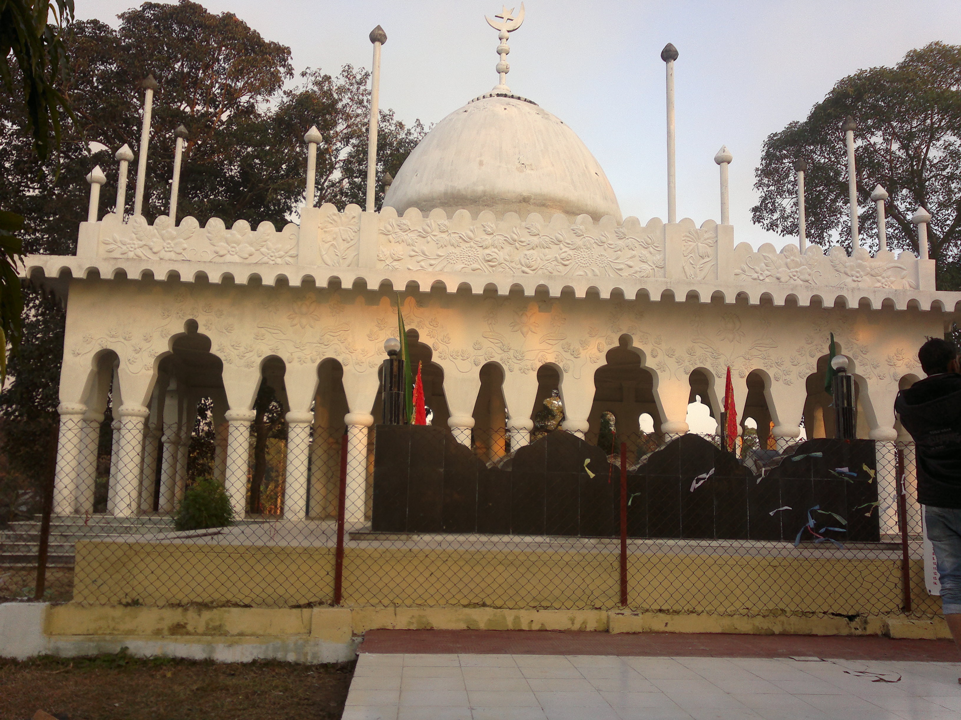 অসমীয়া: হজৰত আজান পীৰ দৰগাহ,স’ৰাগুৰি চাপৰি, শিৱসাগৰ